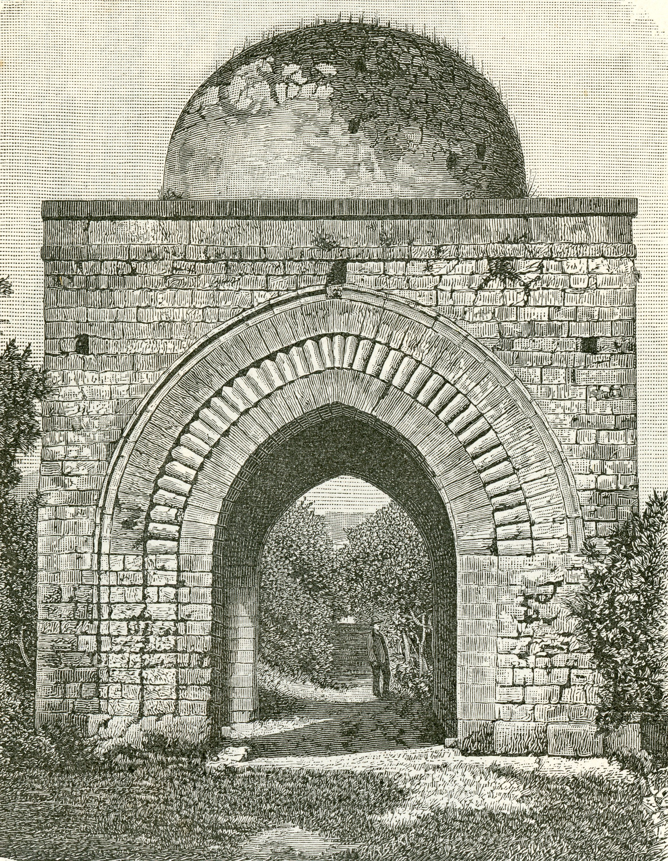 Strafforello Gustavo, La patria, geografia dell'Italia / Parte 5. Italia insulare: Sicilia, Unione Tipografico-Editrice, Torino, 1893.